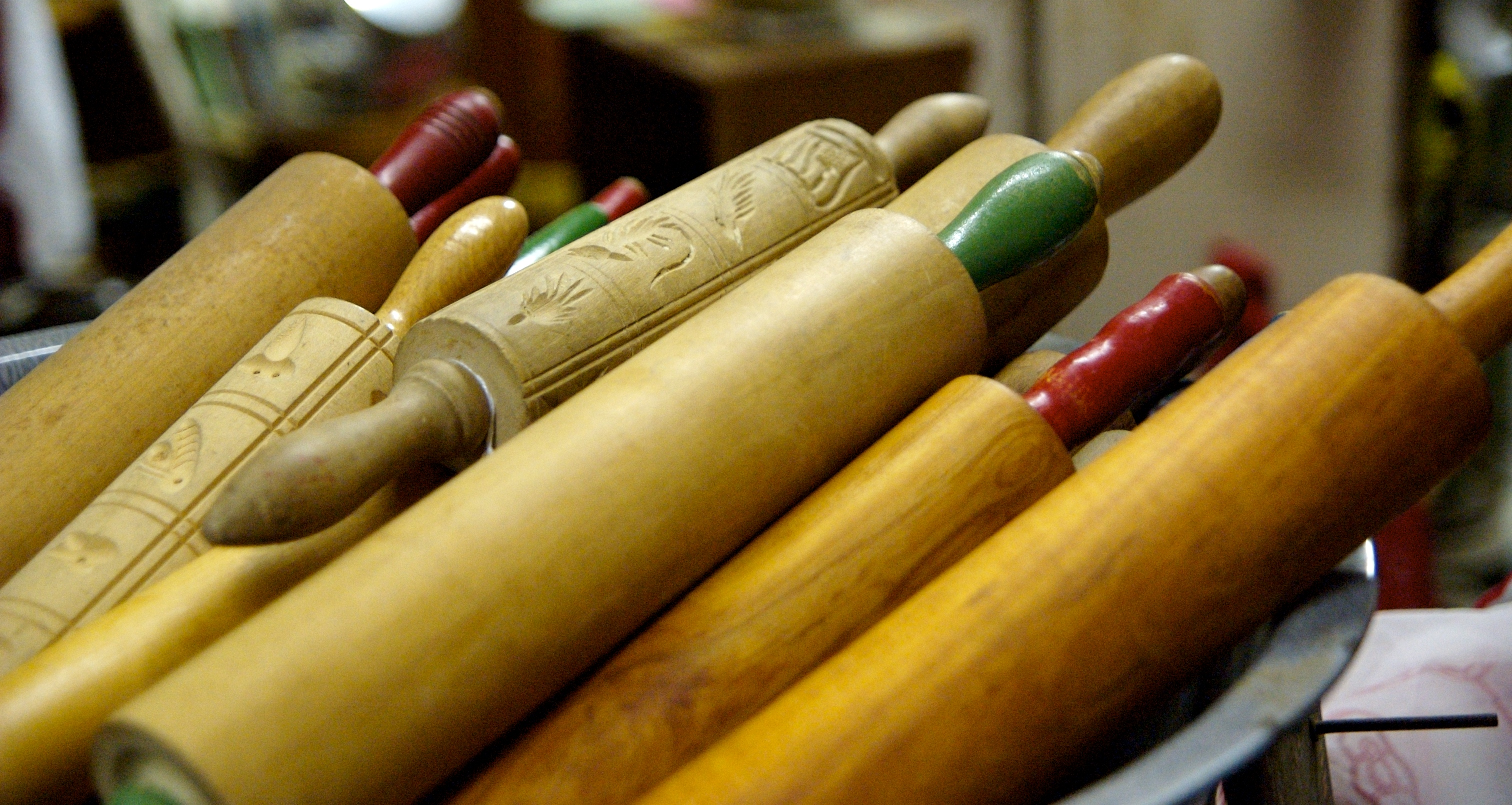 Válassz! Cassandro Ħelyi vita 2009. november 5., 21:04 (CET).